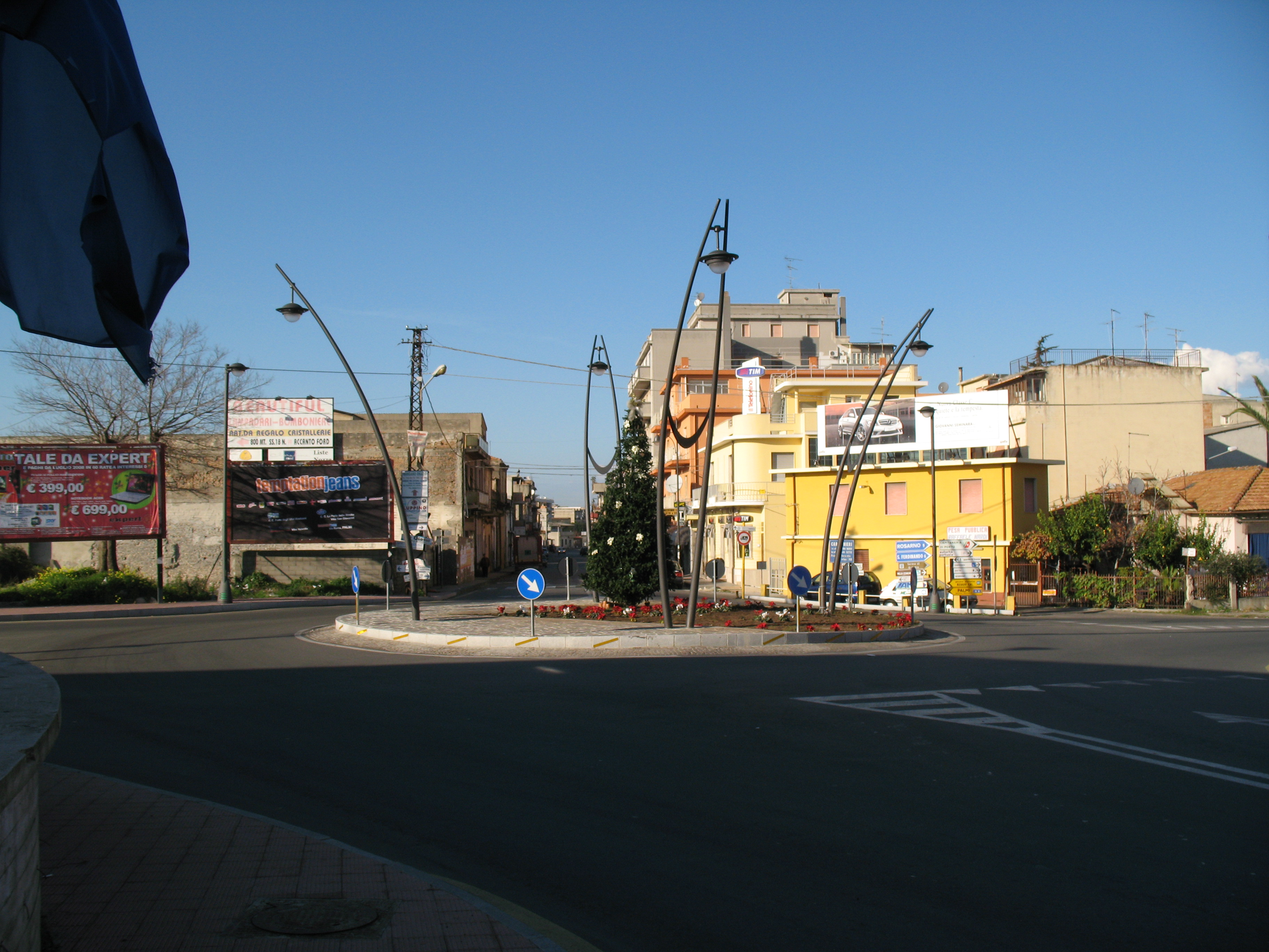 Strada Provinciale 1 di Gioia Tauro e Locri, rotonda all'incrocio con la statale 18 presso Gioia Tauro